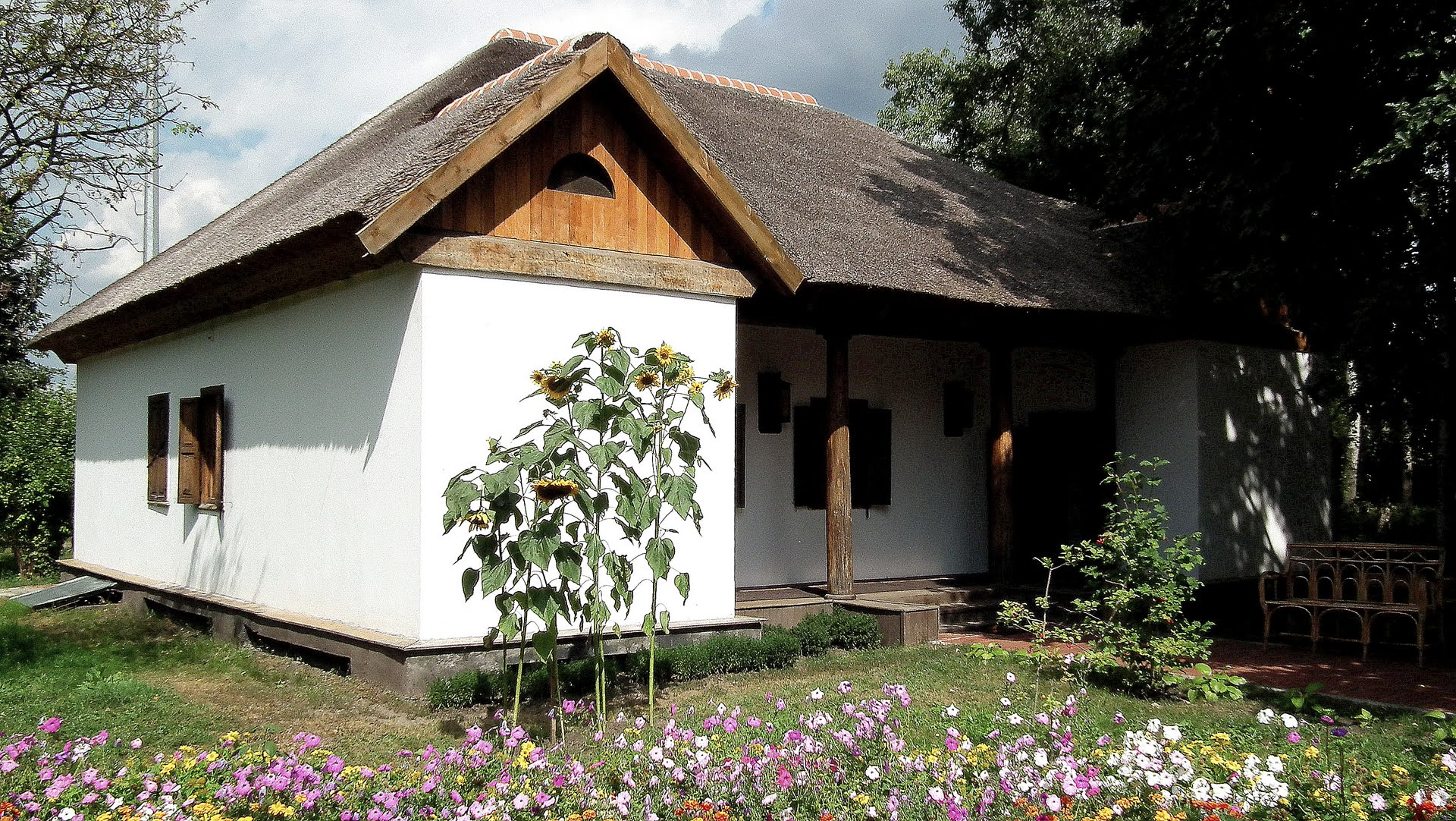 Музей садиба М. В. Гоголя в с. Гоголеве, Полтавської області